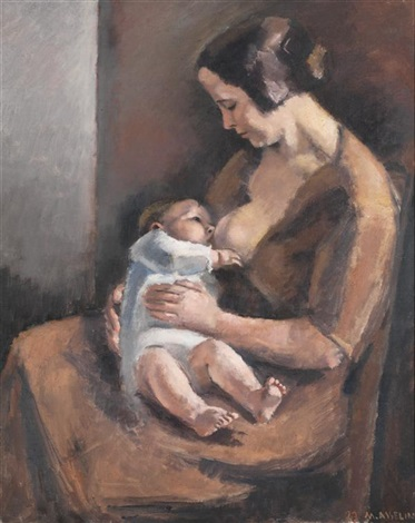 Maternité